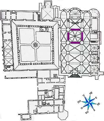 Monestir de Sant Cugat - Plànol cimbori